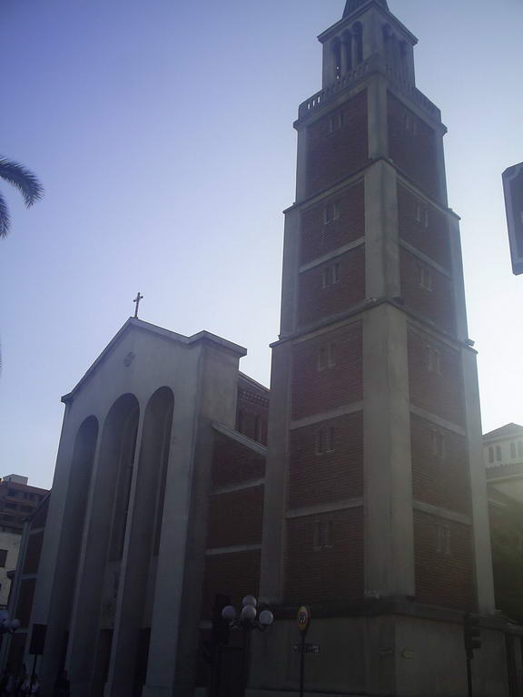 Catedral de Talca.